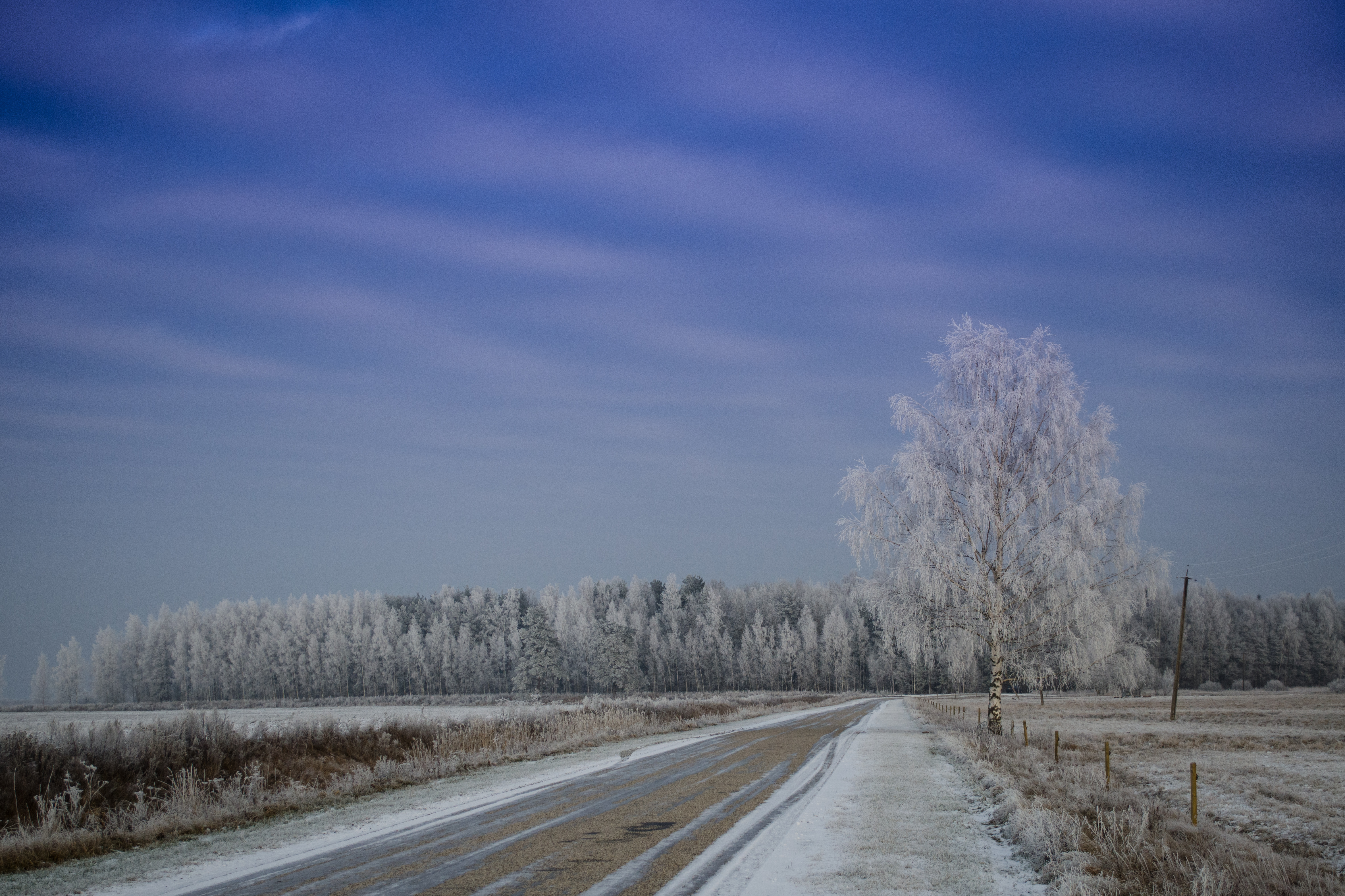 Vaade Räpina poldrile